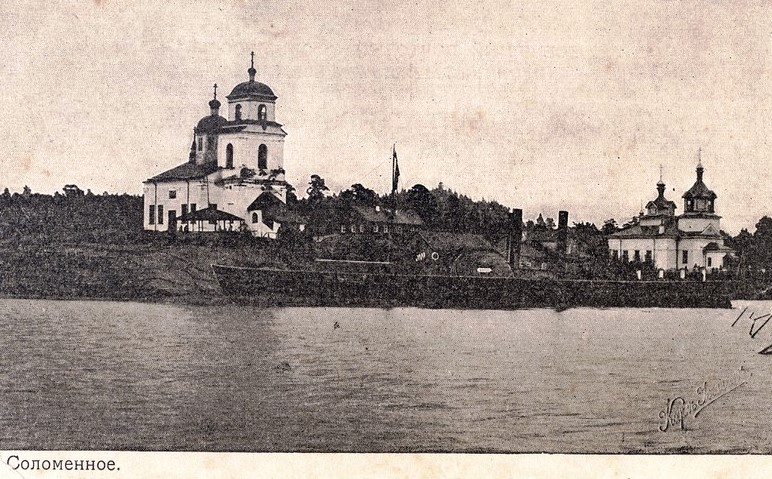 Посёлок Соломенное - пригород Петрозаводска (1904 год).